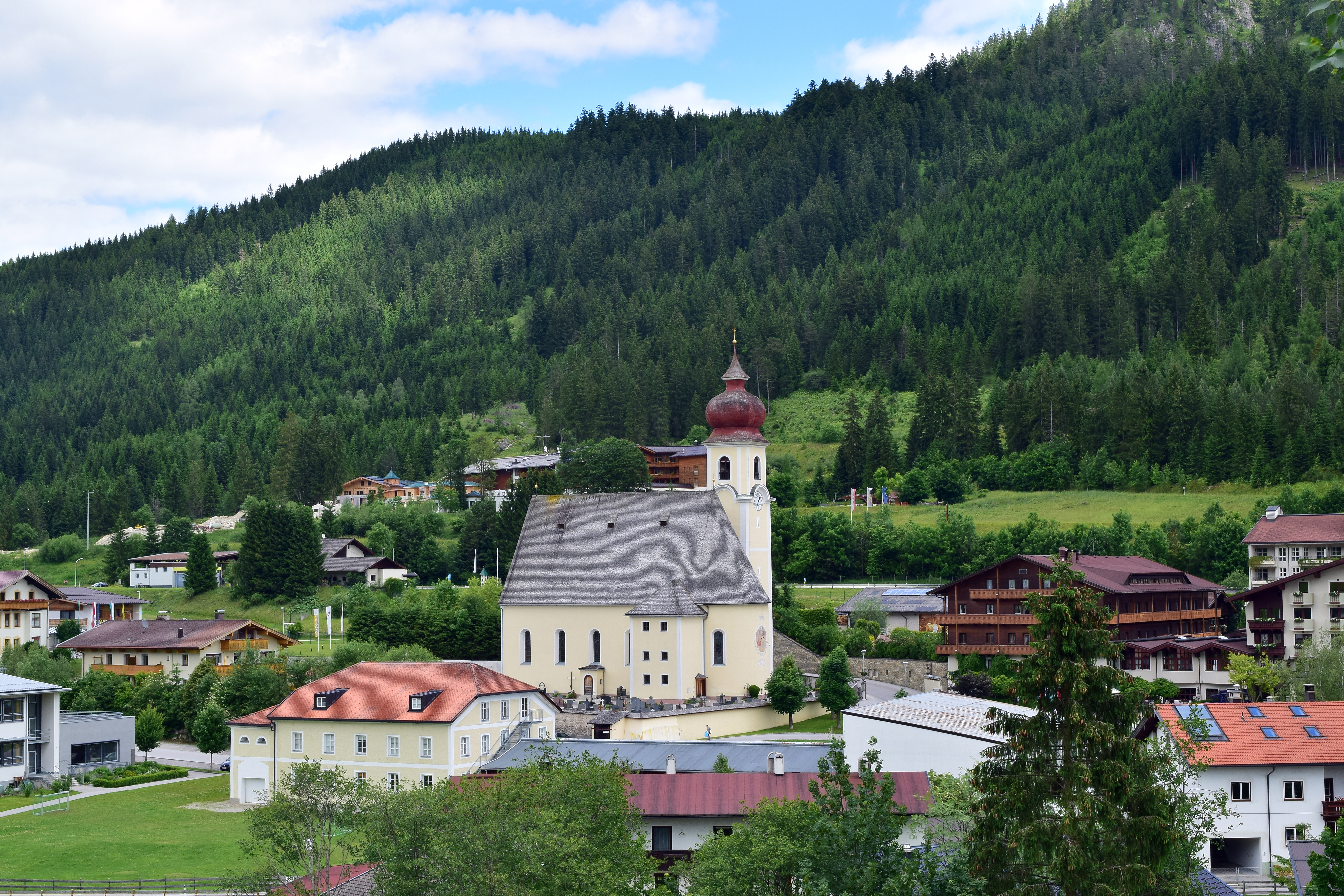 Kath. Pfarrkirche hl. Johannes der Täufer und Friedhof